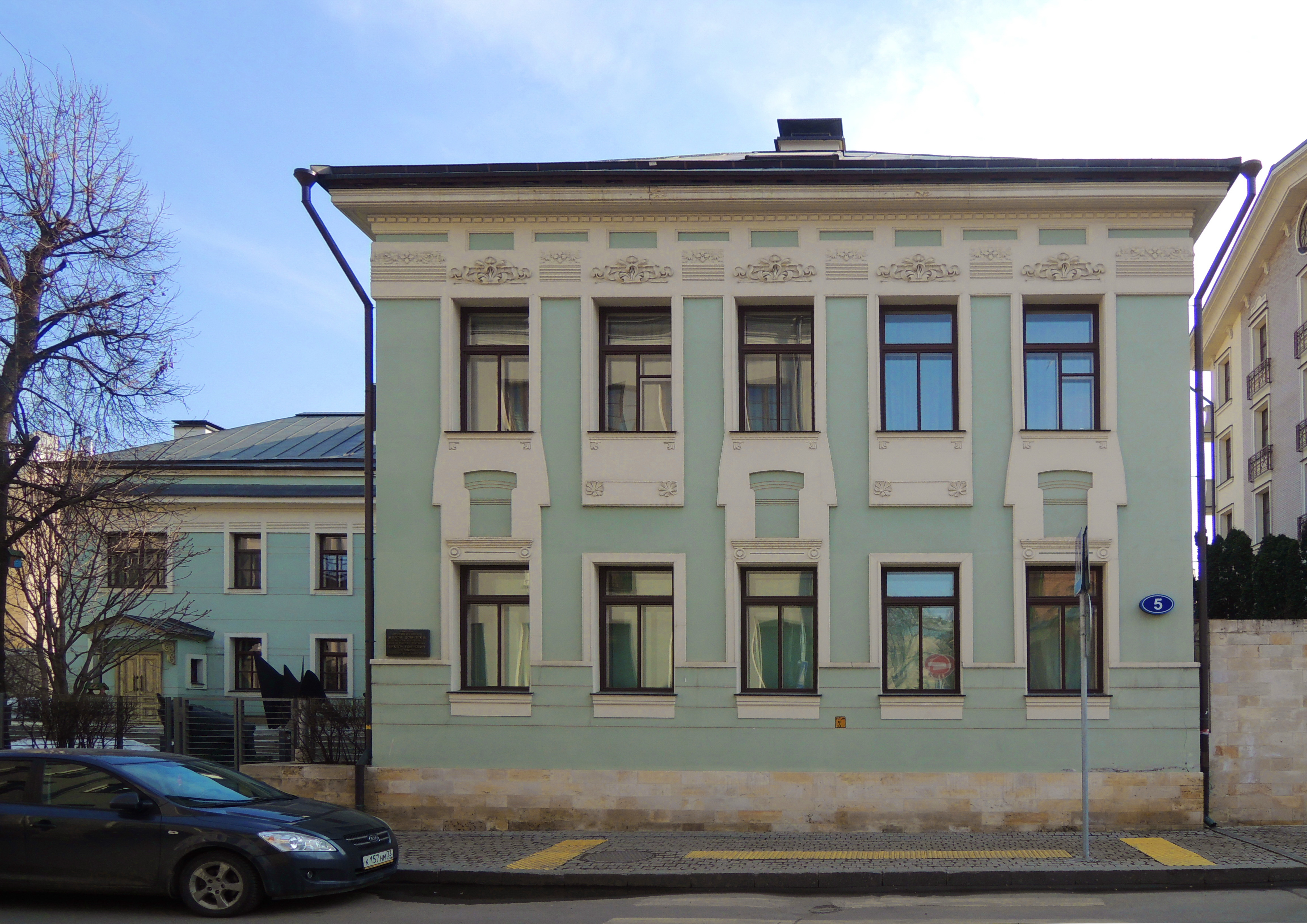 Вид на дом 5 по Молочному переулку